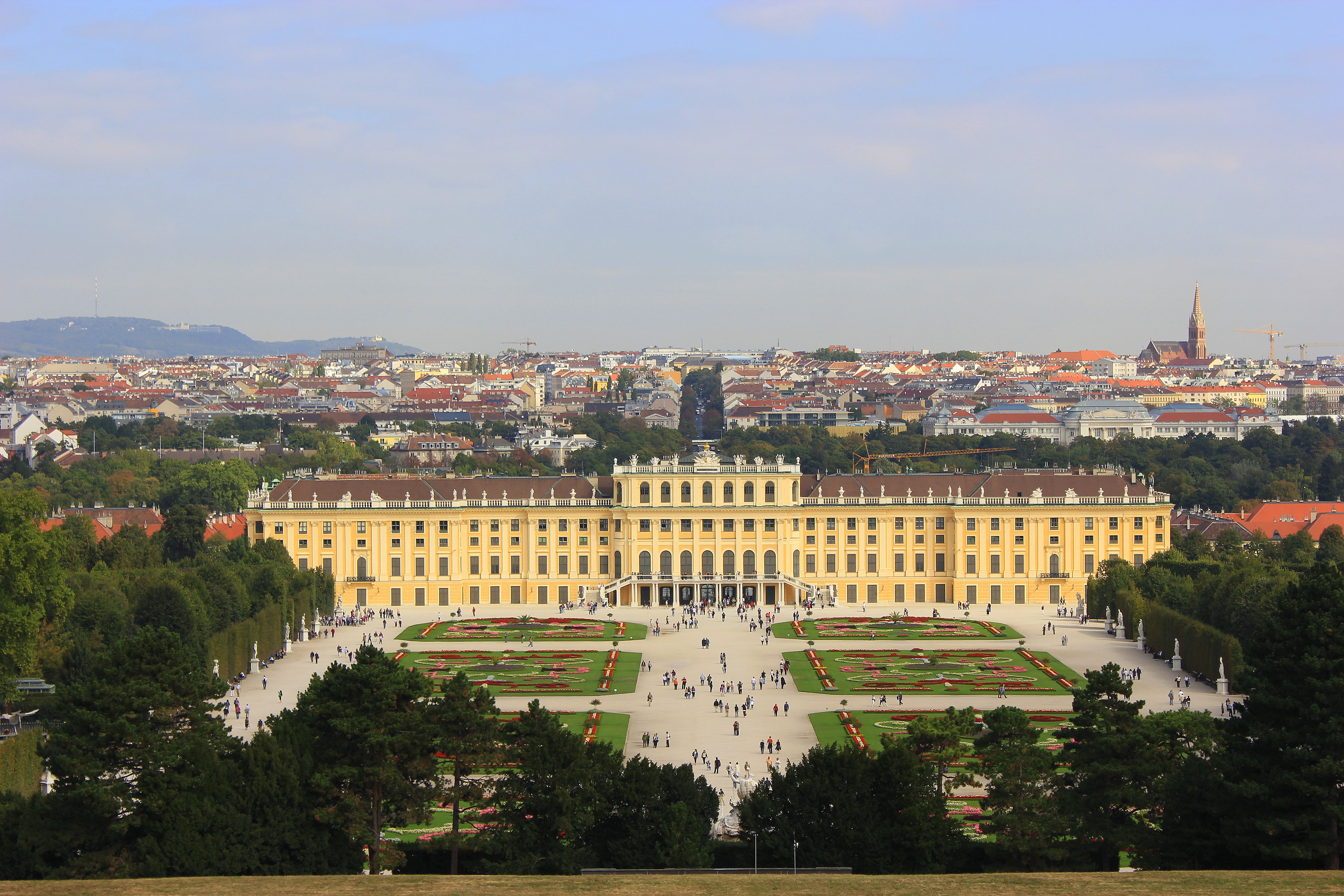 Schönbrunn